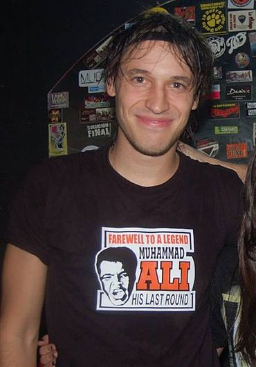 Catriel Ciavarella, baterista de Divididos en 2015.